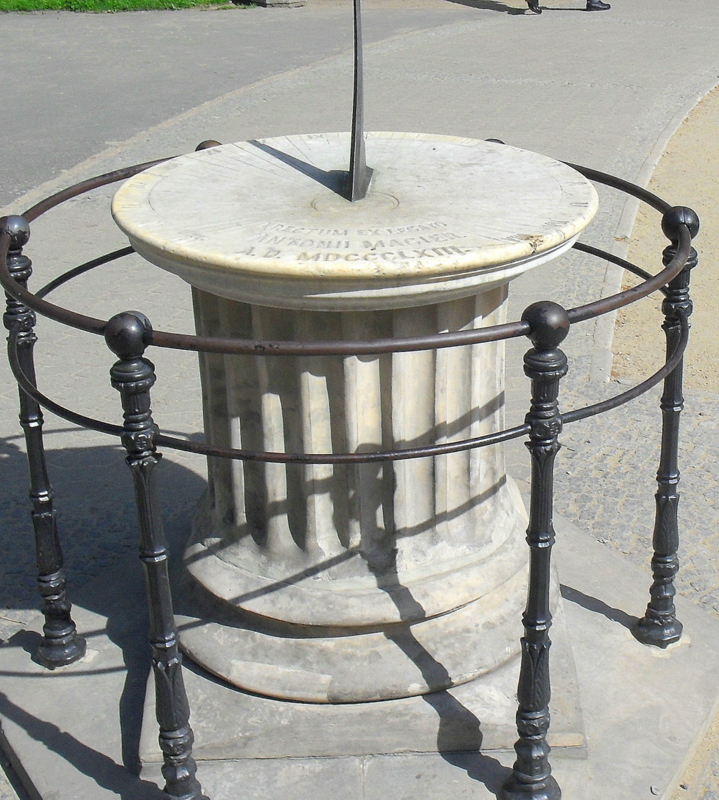 Warszawa, Ogród Saski